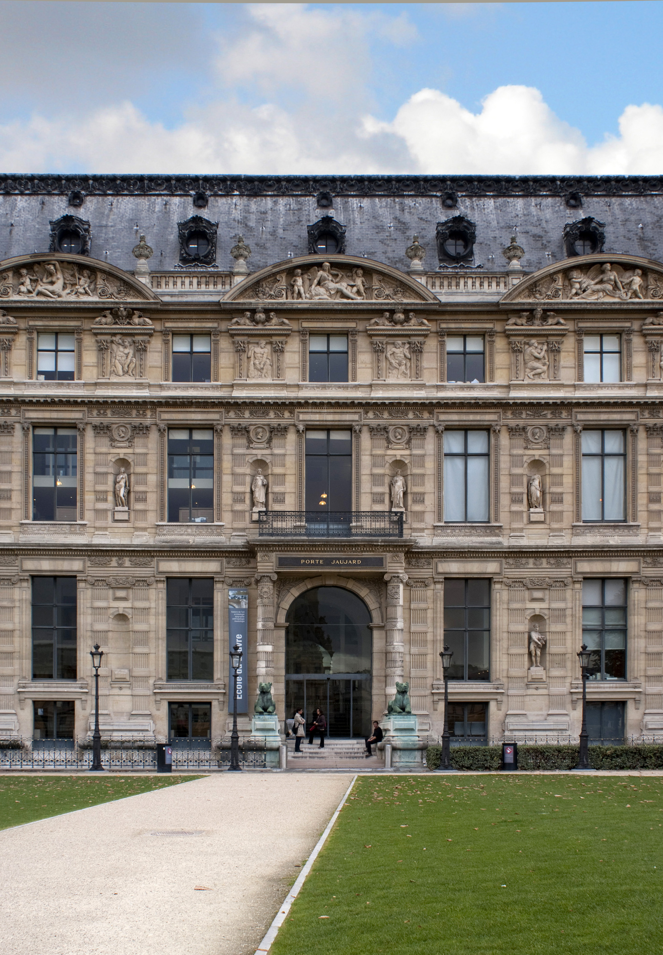 Façade et entrée de l’École du Louvre, porte Jaujard, aile de Flore